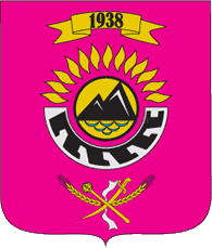 Герб города Марганец